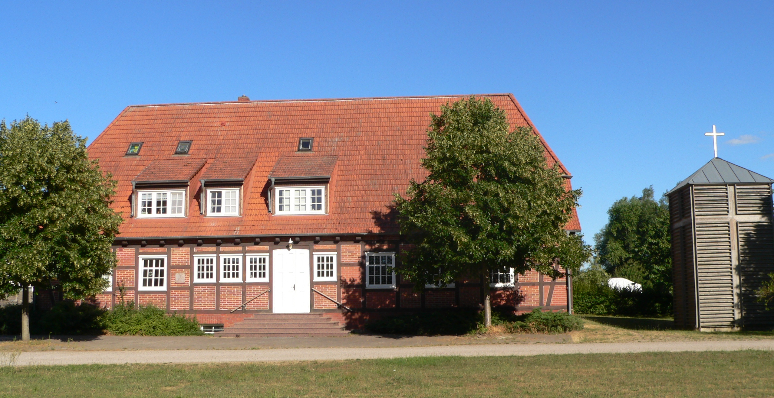 Römisch-katholische Kirche "St. Josef" in Zühr, einem Ortsteil von Körchow in der Stadt Wittenburg, im Landkreis Ludwigslust-Parchim in Mecklenburg-Vorpommern.